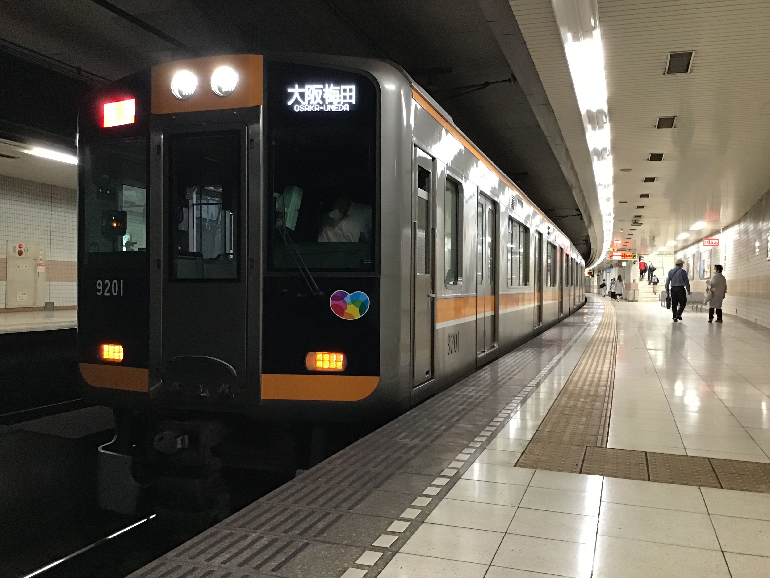 阪神大阪梅田行き特急に運用される9201F